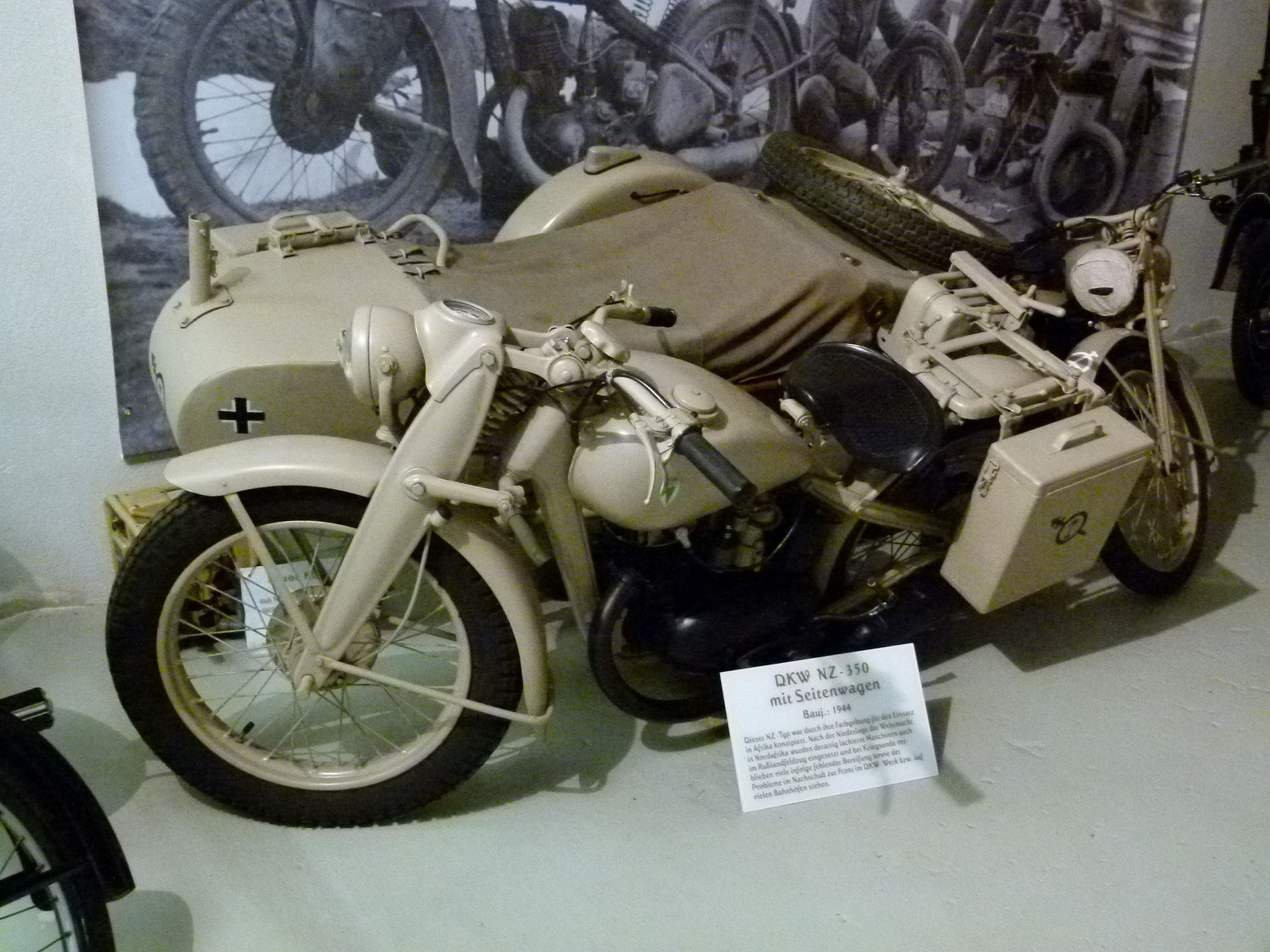 DKW NZ-350 mit Seitenwagen, 1944, Fahrzeugmuseum Chemnitz